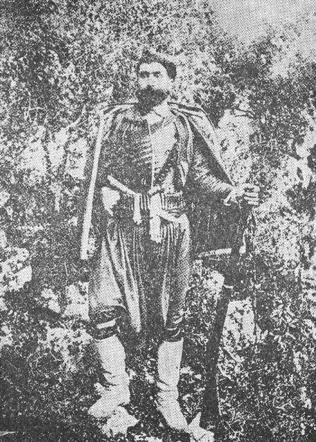 Леонидас Папамалекос